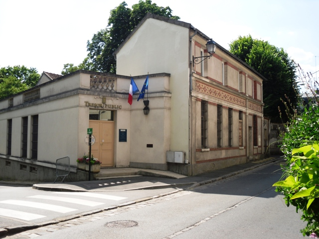 Le Trésor Public à Bièvres (91)